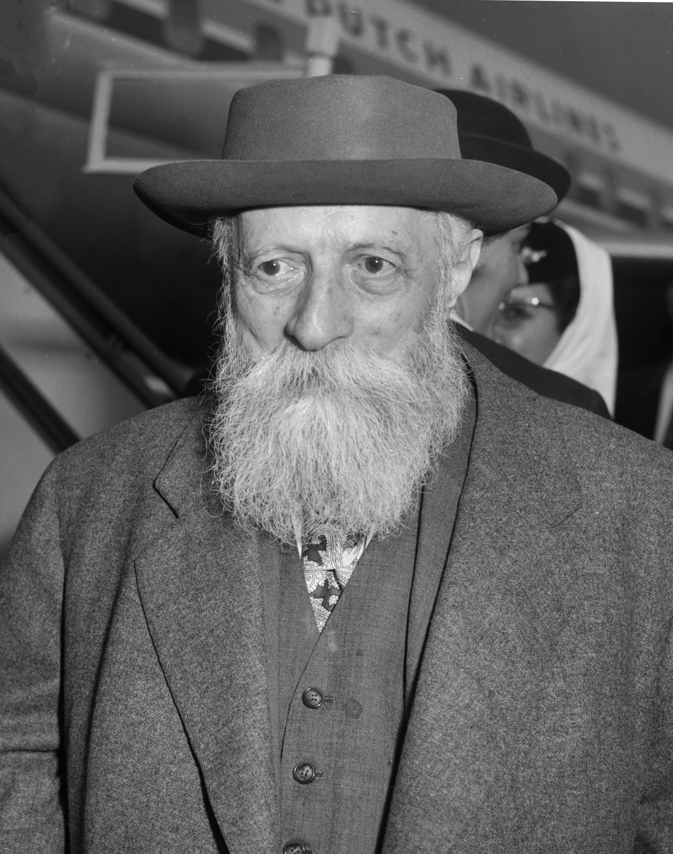 Professor Martin Buber arriveerde op Schiphol voor in ontvangstnemen Erasmus-prijs. Professor Martin Buber